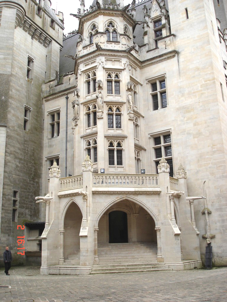 L'une des entrées de la visite du château de Pierrefonds,photo prise par mes soins en avril 2006